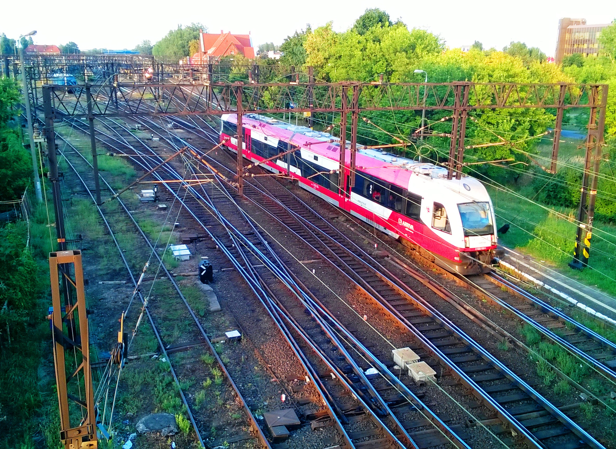 Toruń Wschodni22